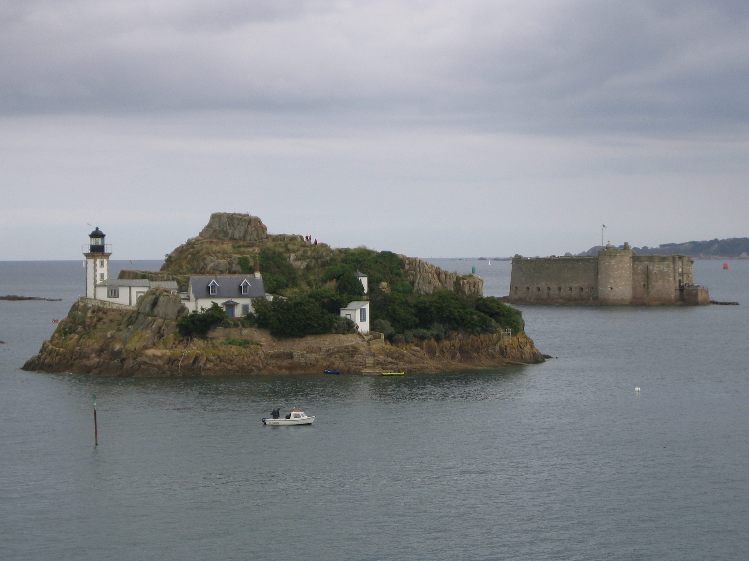 Le château du Taureau en baie de Morlaix, à Carantec, vu du sentier cotier à Carantec